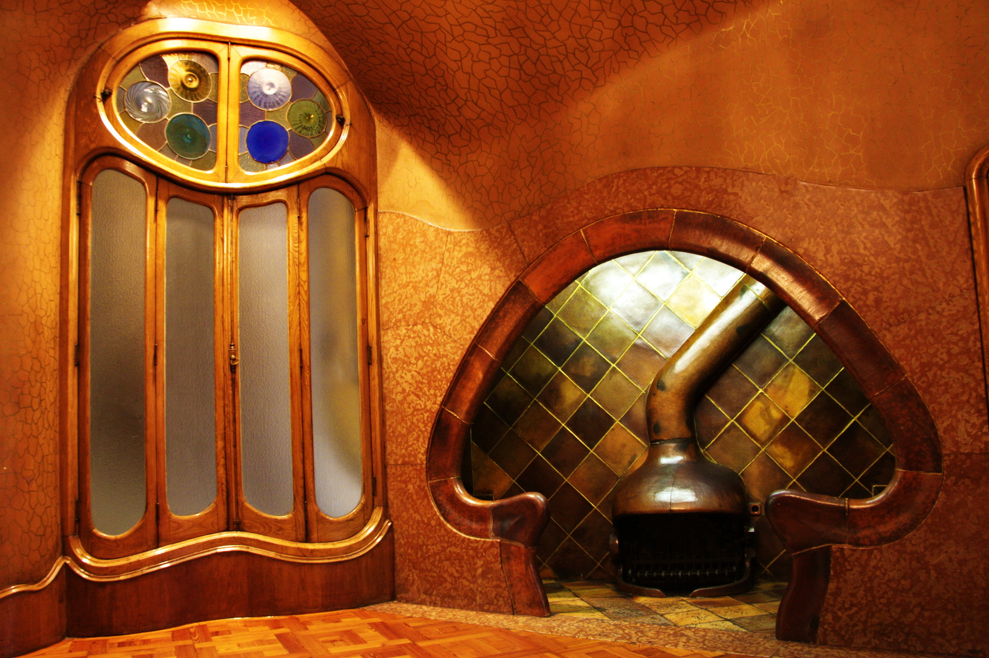 Llar de foc de la Casa Batlló (1905-1907), obra d'Antoni Gaudí